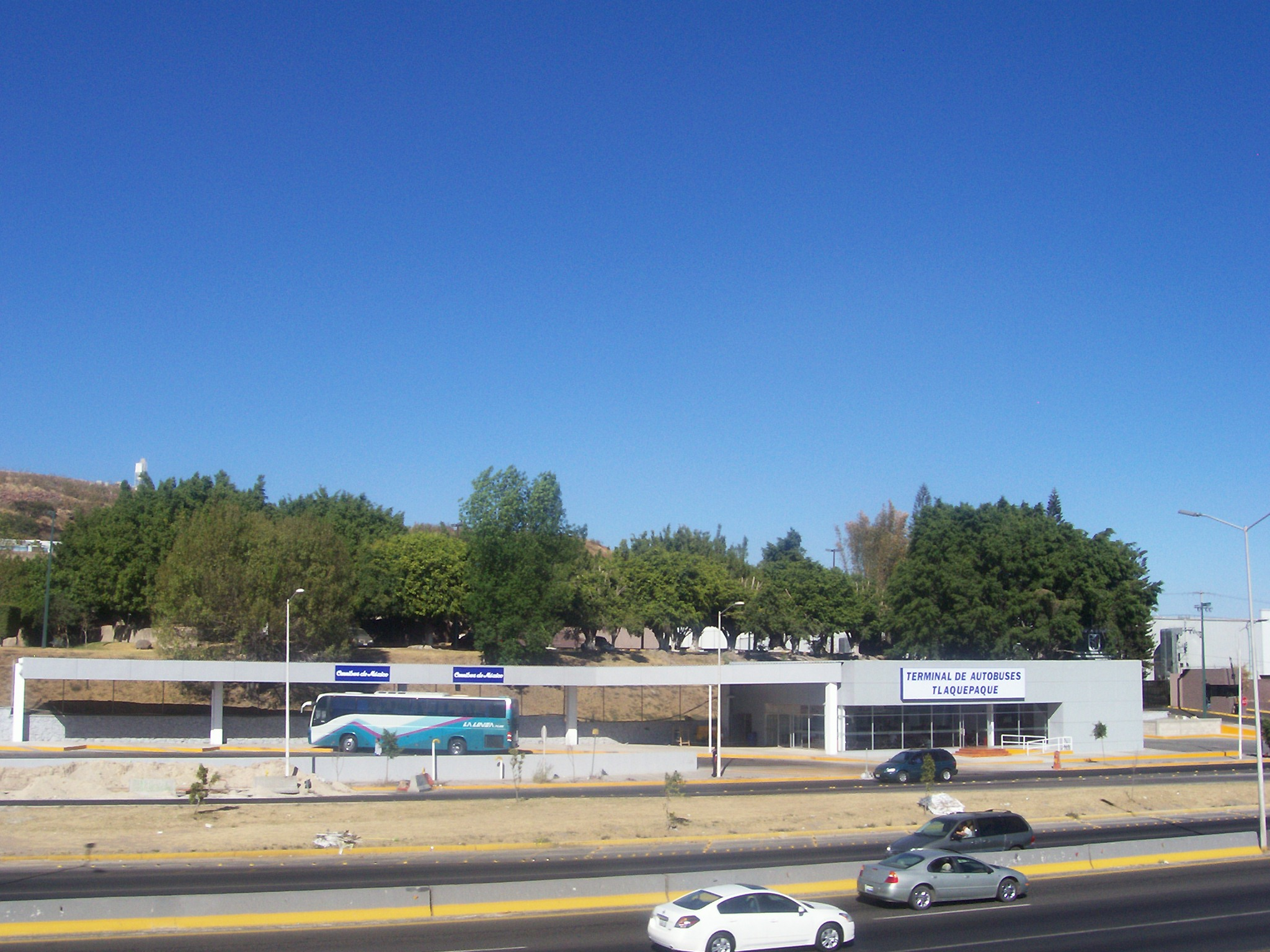 Foto de la Central de Autobuses de Tlaquepaque en periferico Sur